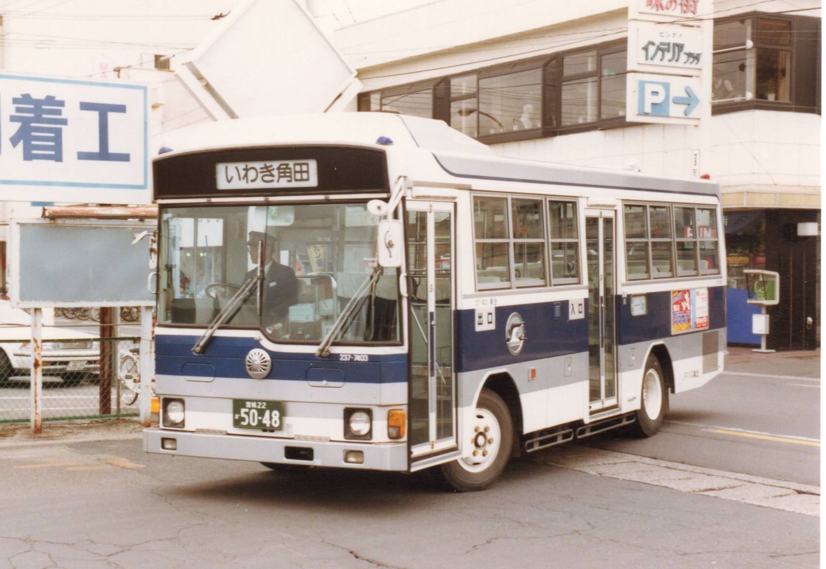 磐城角田駅にて撮影 ネガ紛失につき、撮影時期不明